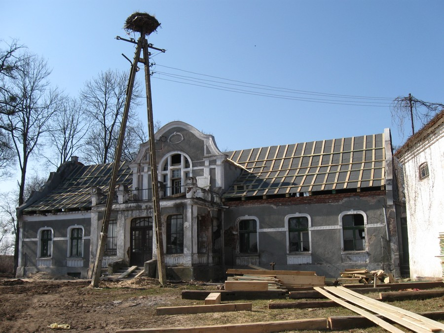 Kalis, dwór